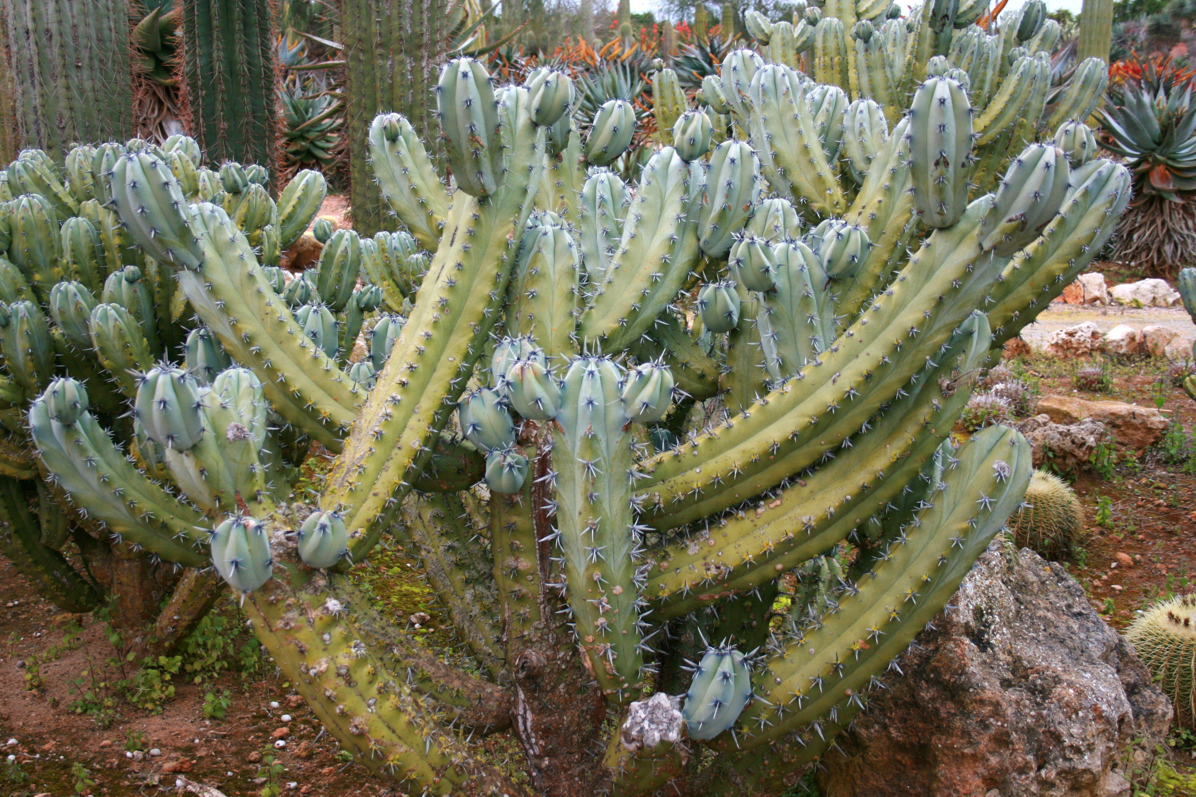 Botanicactus in Ses Salines, Mallorca, Spain